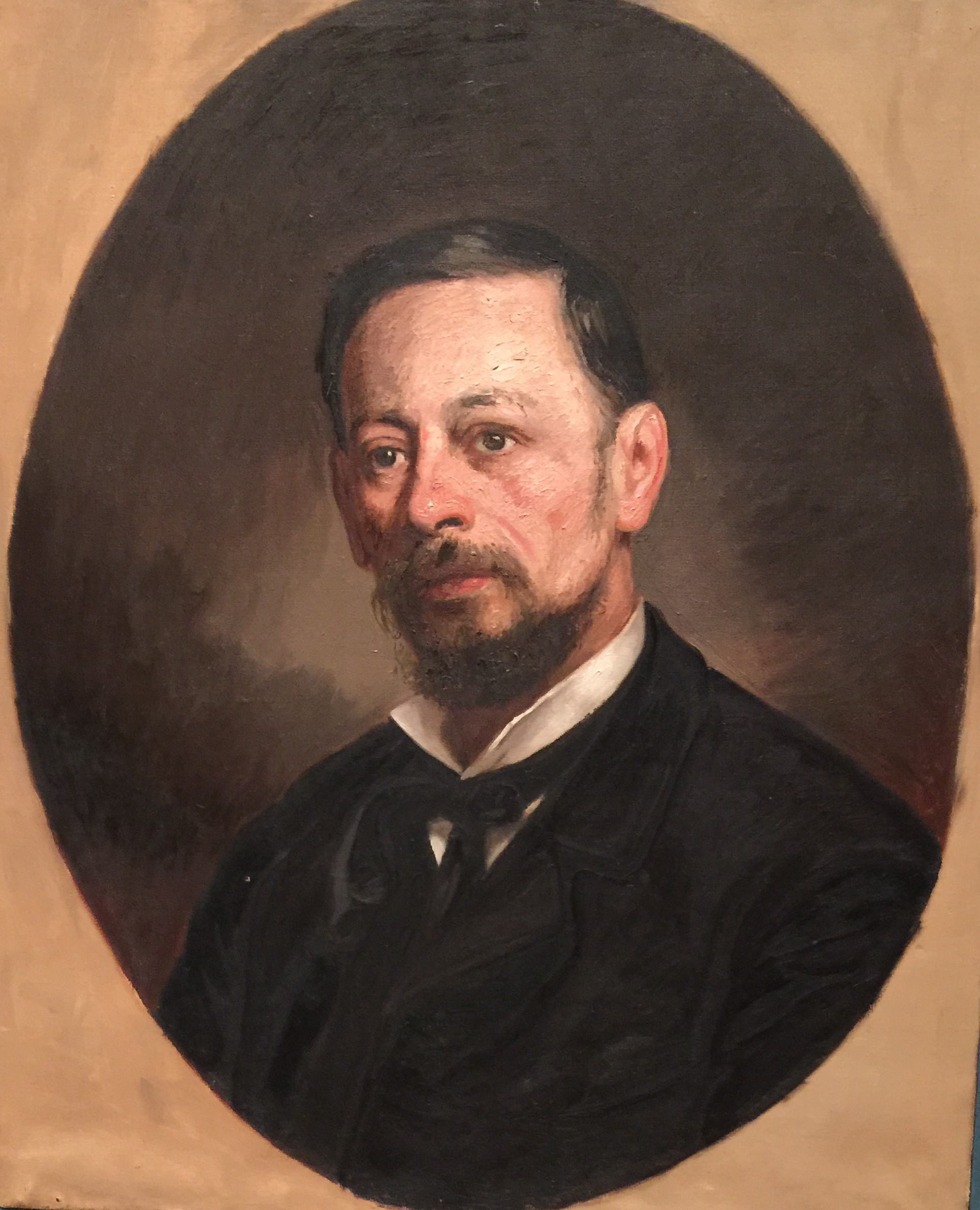 Retrato de José Miguel Blanco en óleo sobre tela de Ezequiel Plaza